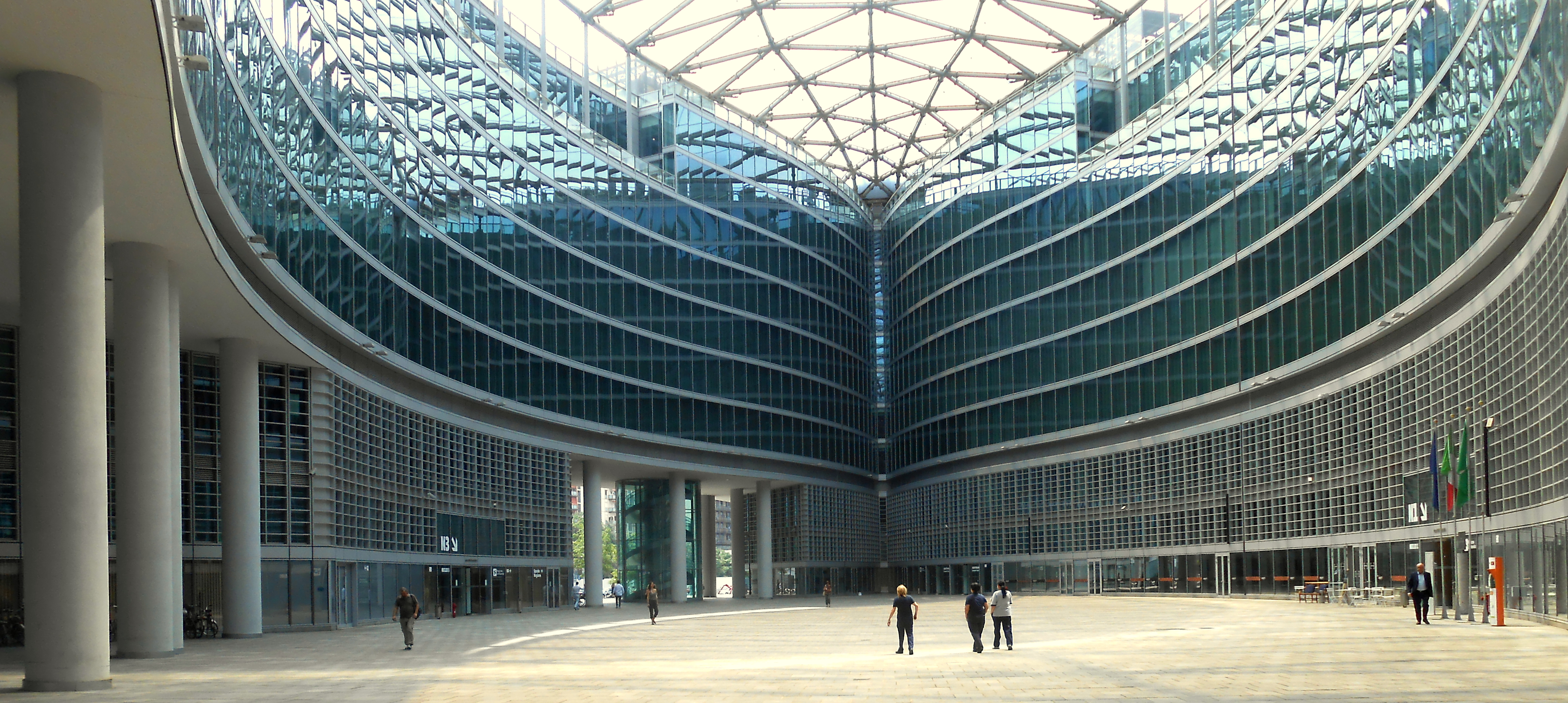 Piazza Lombardia della Regione Lombardia, vista dall'ingresso di via Melchiorre Gioia - Milano